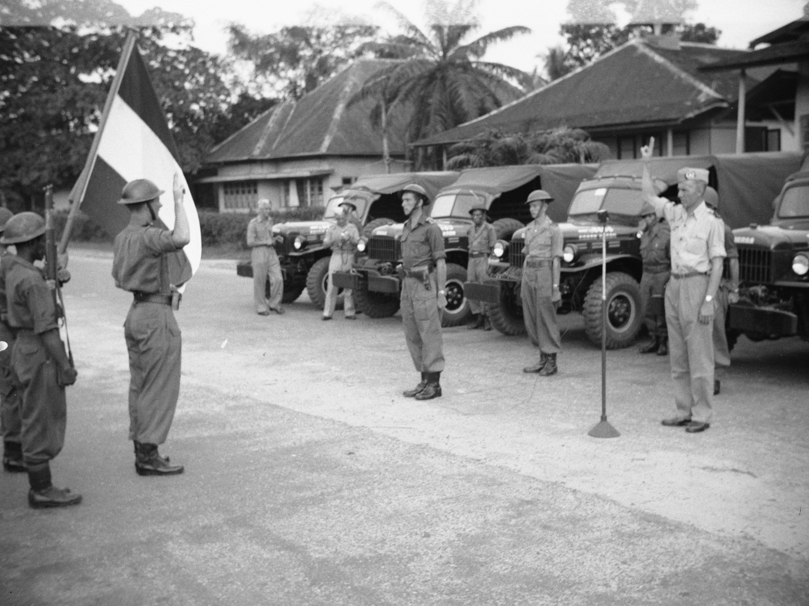 Collectie / Archief : Fotocollectie Dienst voor Legercontacten Indonesië Reportage / Serie : [DLC] Beëdiging Bandjermassin Datum : 10 mei 1949 Locatie : Bandjermasin, Borneo, Indonesië, Kalimantan, Nederlands-Indië Fotograaf : Jochemsen, [...] / DLC Auteursrechthebbende : Nationaal Archief Materiaalsoort : Negatief (zwart/wit) Nummer archiefinventaris : bekijk toegang 2.24.04.03 Bestanddeelnummer : 15615